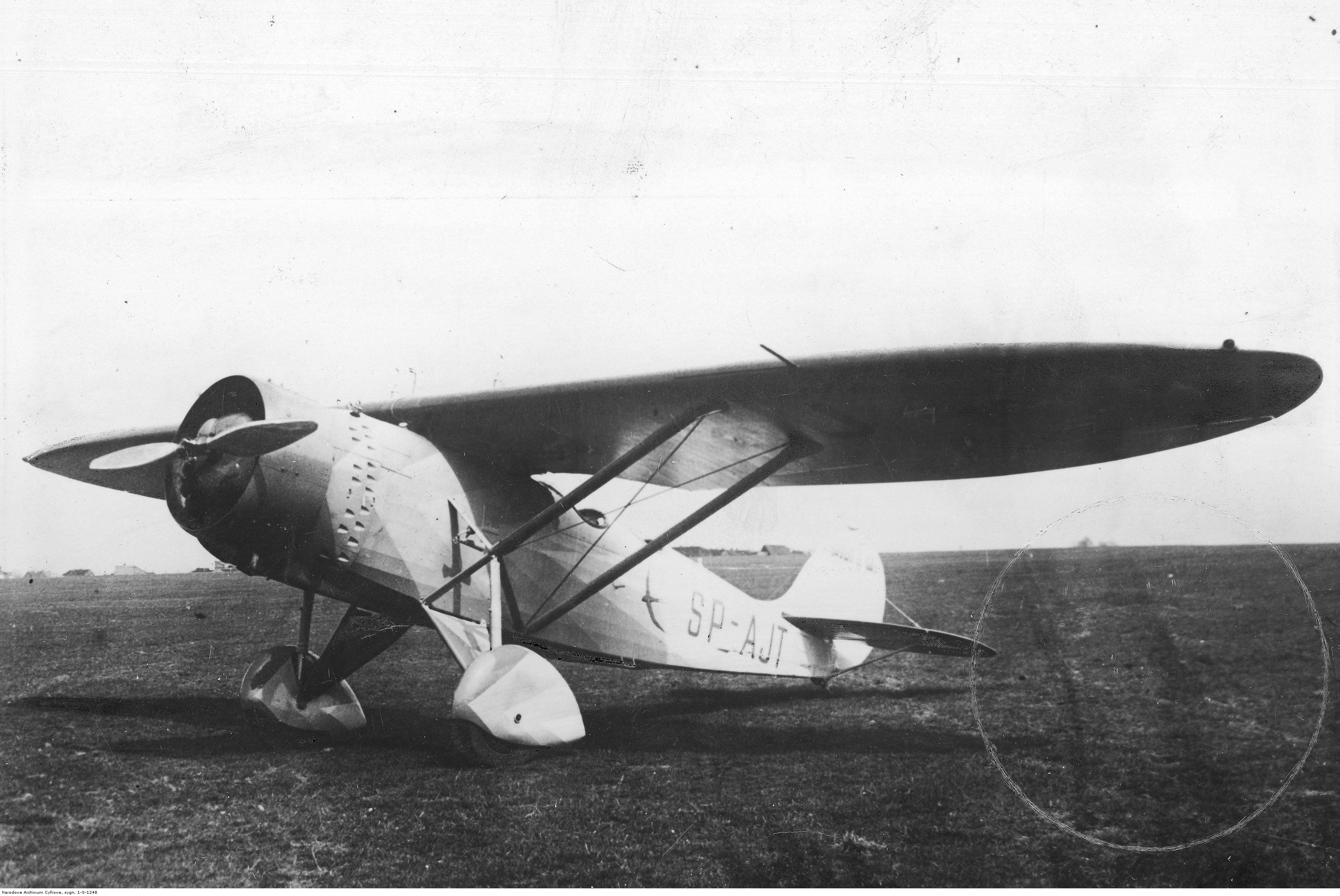 Samolot Lublin R-XIII Dr, na którym załoga w składzie Stanisław Karpiński i Wiktor Rogalski miała odbyć lot na trasie Warszawa-Melbourne.